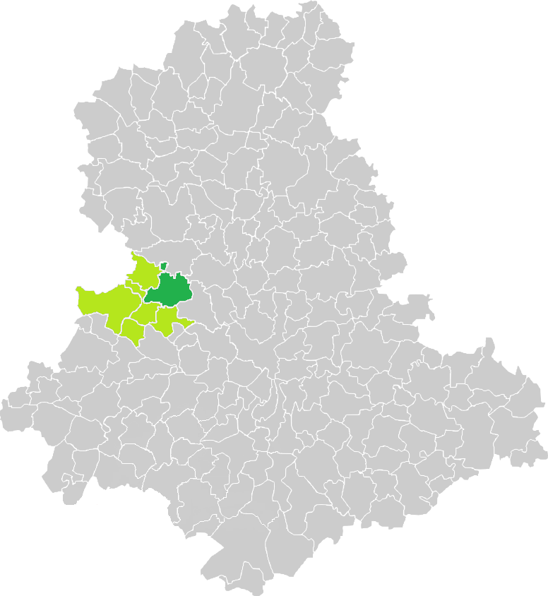 Carte de situation de la commune d'Oradour-sur-Glane (en vert foncé) dans le votre Canton (en vert clair) sur une carte des communes de la Haute-Vienne